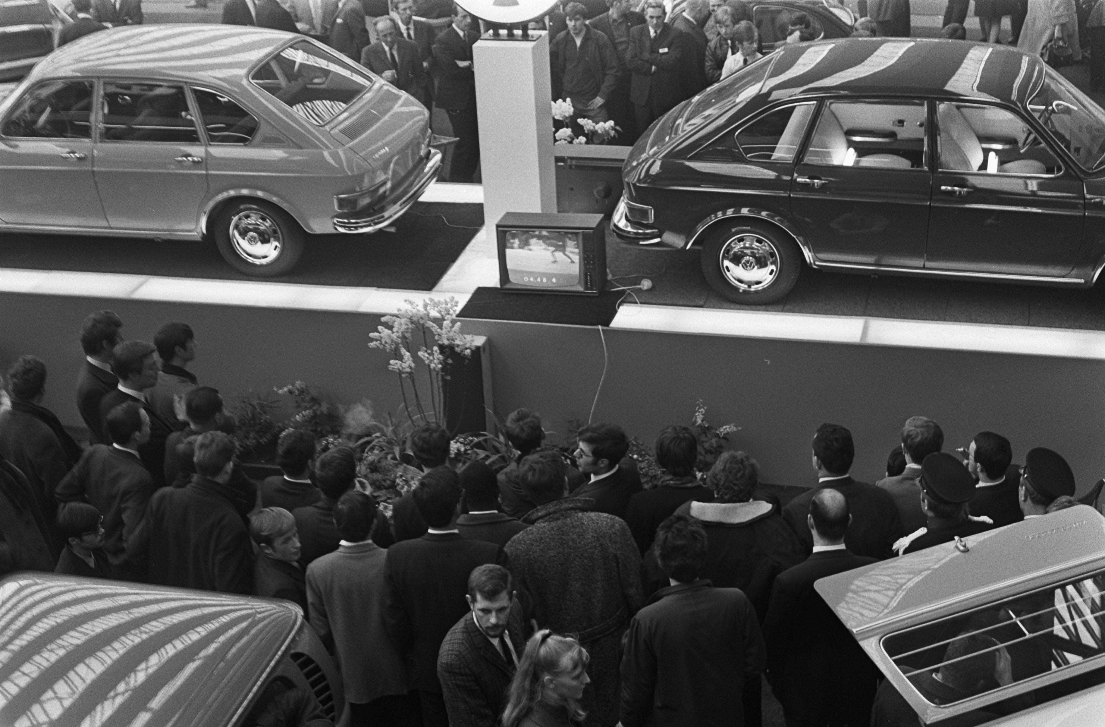 Collectie / Archief : Fotocollectie Anefo Reportage / Serie : [ onbekend ] Beschrijving : Drukte op de auto-tentoonstelling in de RAI kijken naar schaatswedstrijden op TV Datum : 16 februari 1969 Locatie : Amsterdam, Noord-Holland Trefwoorden : auto's Instellingsnaam : RAI Fotograaf : Nijs, Jac. de / Anefo Auteursrechthebbende : Nationaal Archief Materiaalsoort : Negatief (zwart/wit) Nummer archiefinventaris : bekijk toegang 2.24.01.05 Bestanddeelnummer : 922-1078